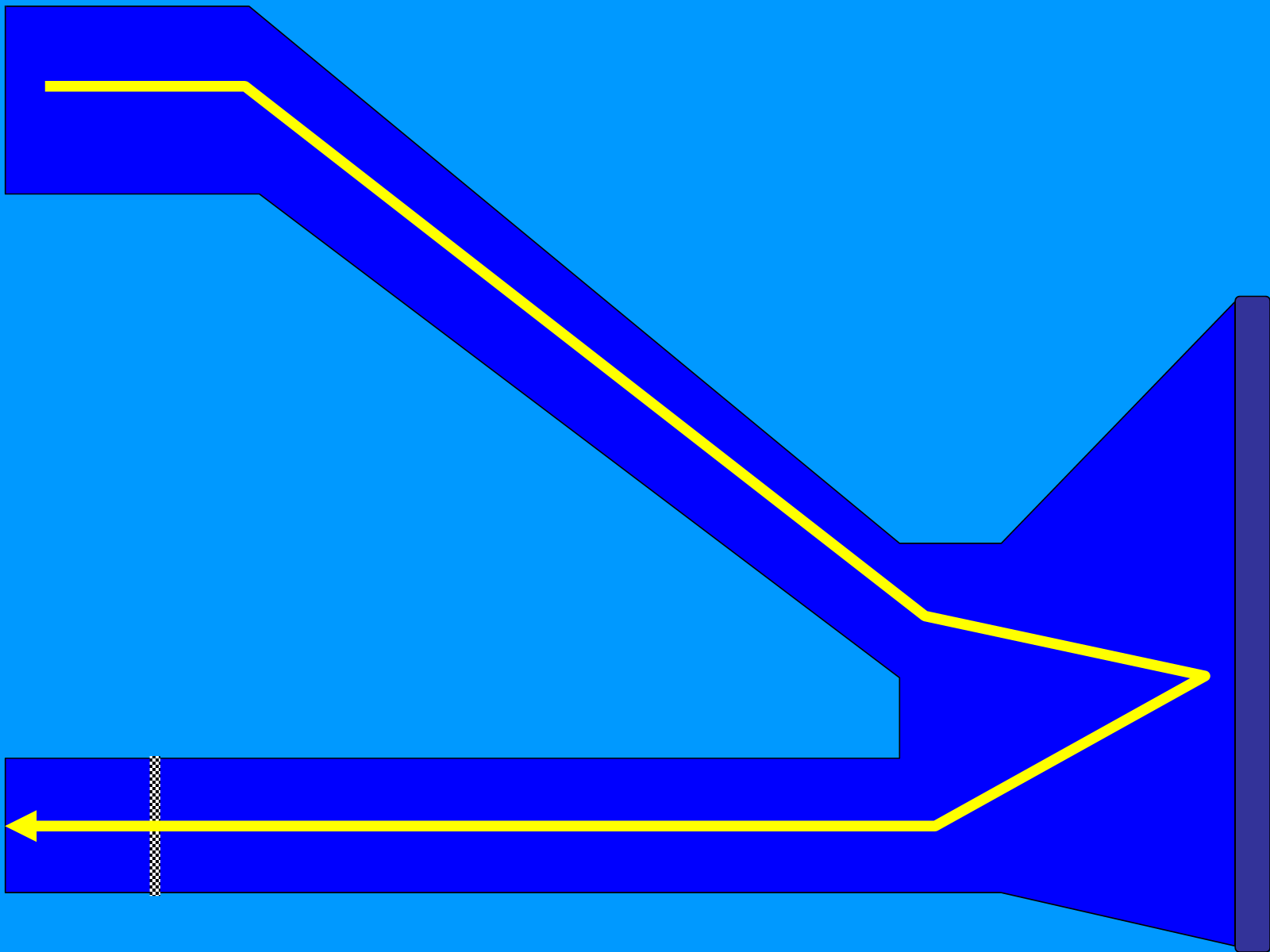 Tekening van traject Te land, ter zee en in de lucht